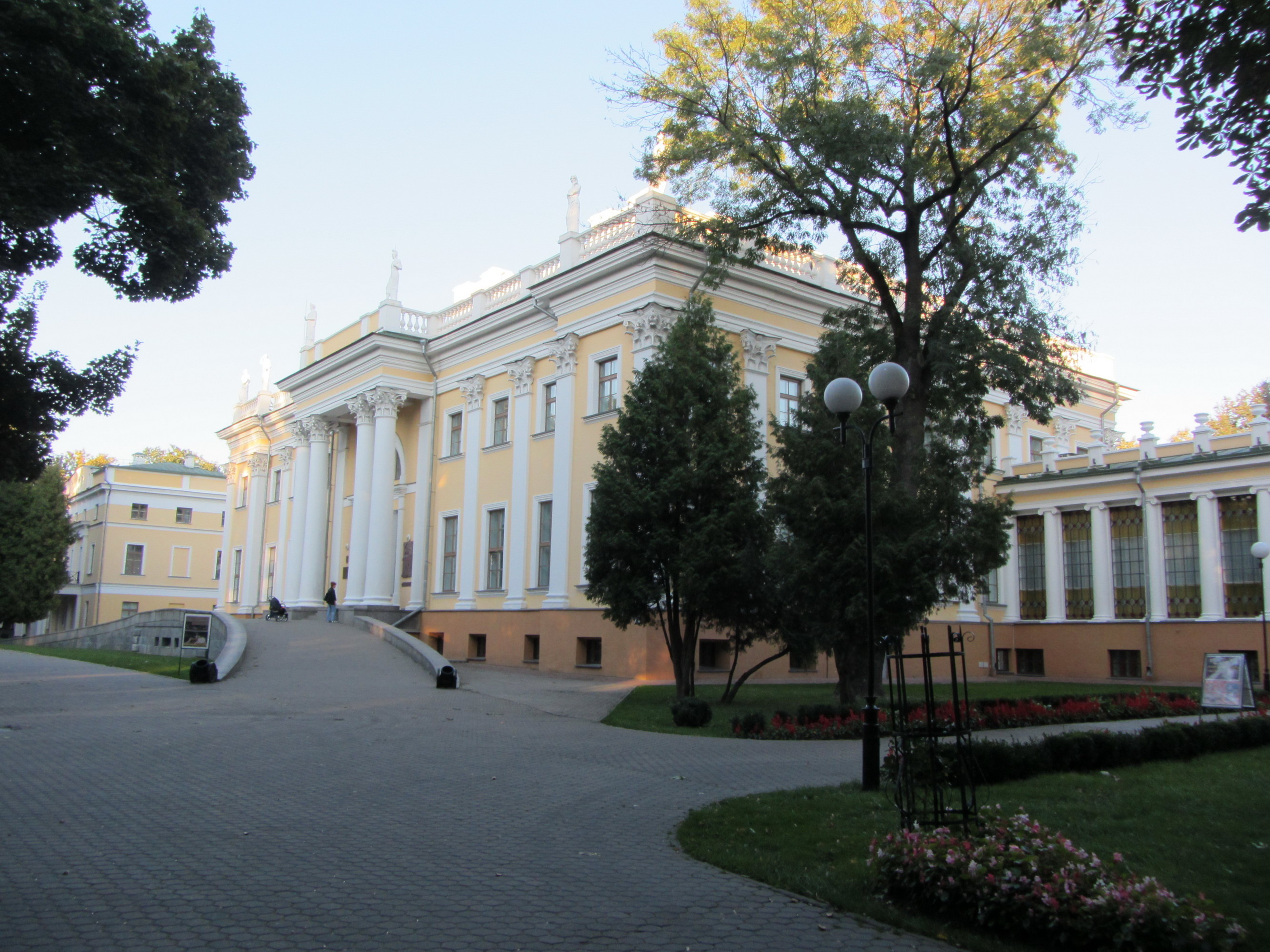 Беларуская (тарашкевіца): Палацава-паркавы ансамбаль: палац, дэкаратыўнае аздабленьне інтэр’ера вежы і цэнтральнай залі палаца, Петрапаўлаўскі сабор, капліца-пахавальня,парк. г. Гомель This is a photo of Belarusian heritage monument. Reference number: 310Г000044 ( WLM)